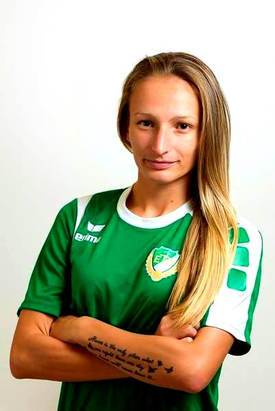 Németh Loretta az ETO FC Győr női csapatának tehetséges labdarúgója.